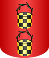 Escudo de la Casa de Lara